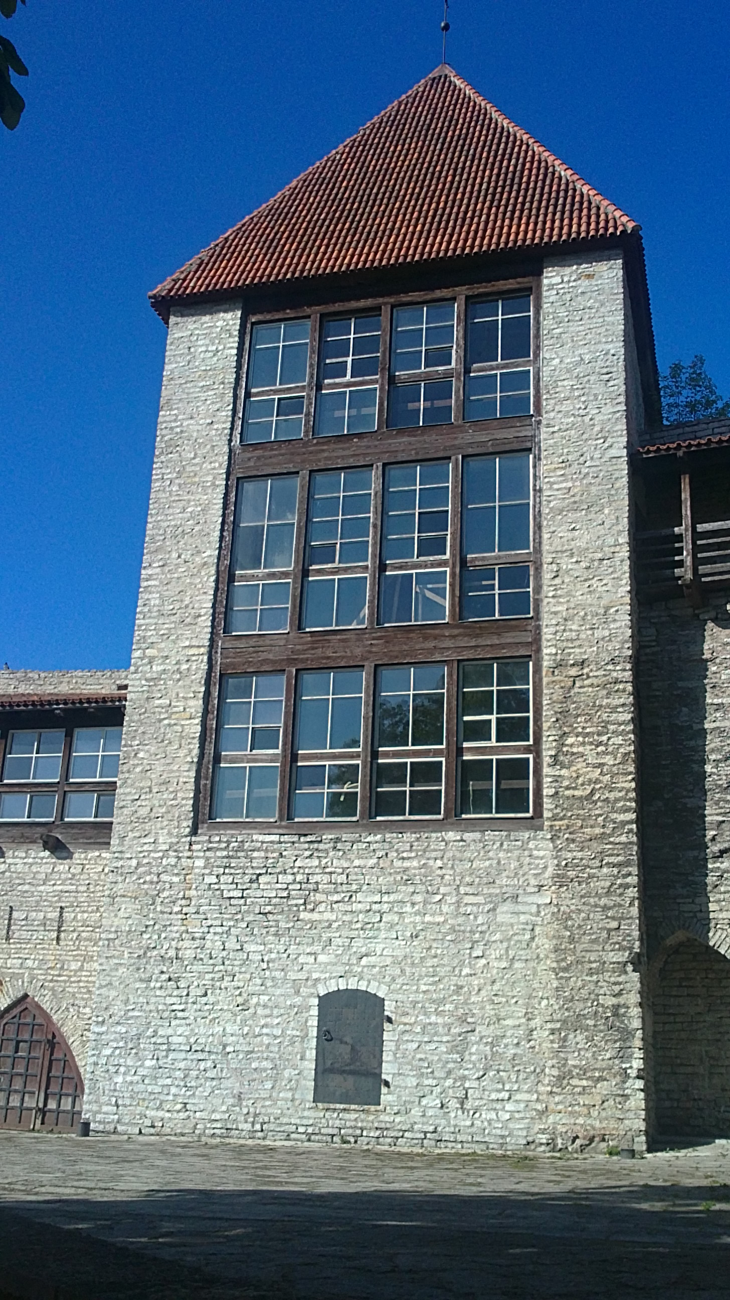 Tallinna linnamüüri, Neitsitorn